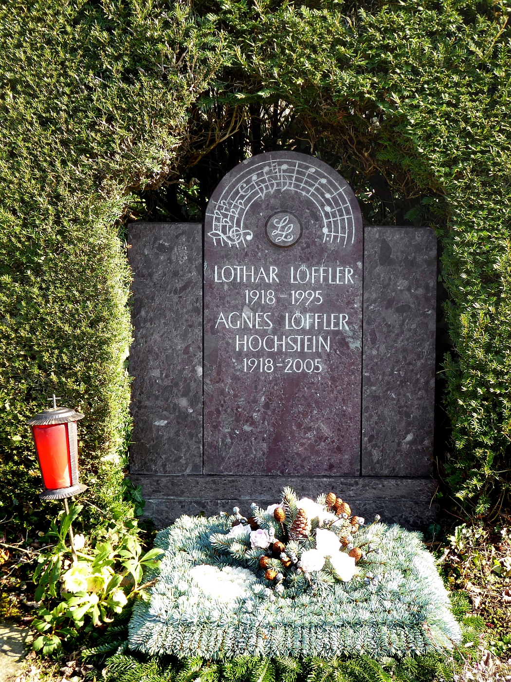 Lothar Löffler-Hochstein (1918–1995) Musiker, Pianist, Komponist, Arrangeur, Agnes Löffler-Hochstein (1918–2005) Grab auf dem Friedhof Hörnli, Riehen, Basel-Stadt